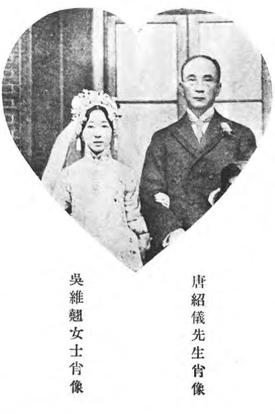 治家全書圖像